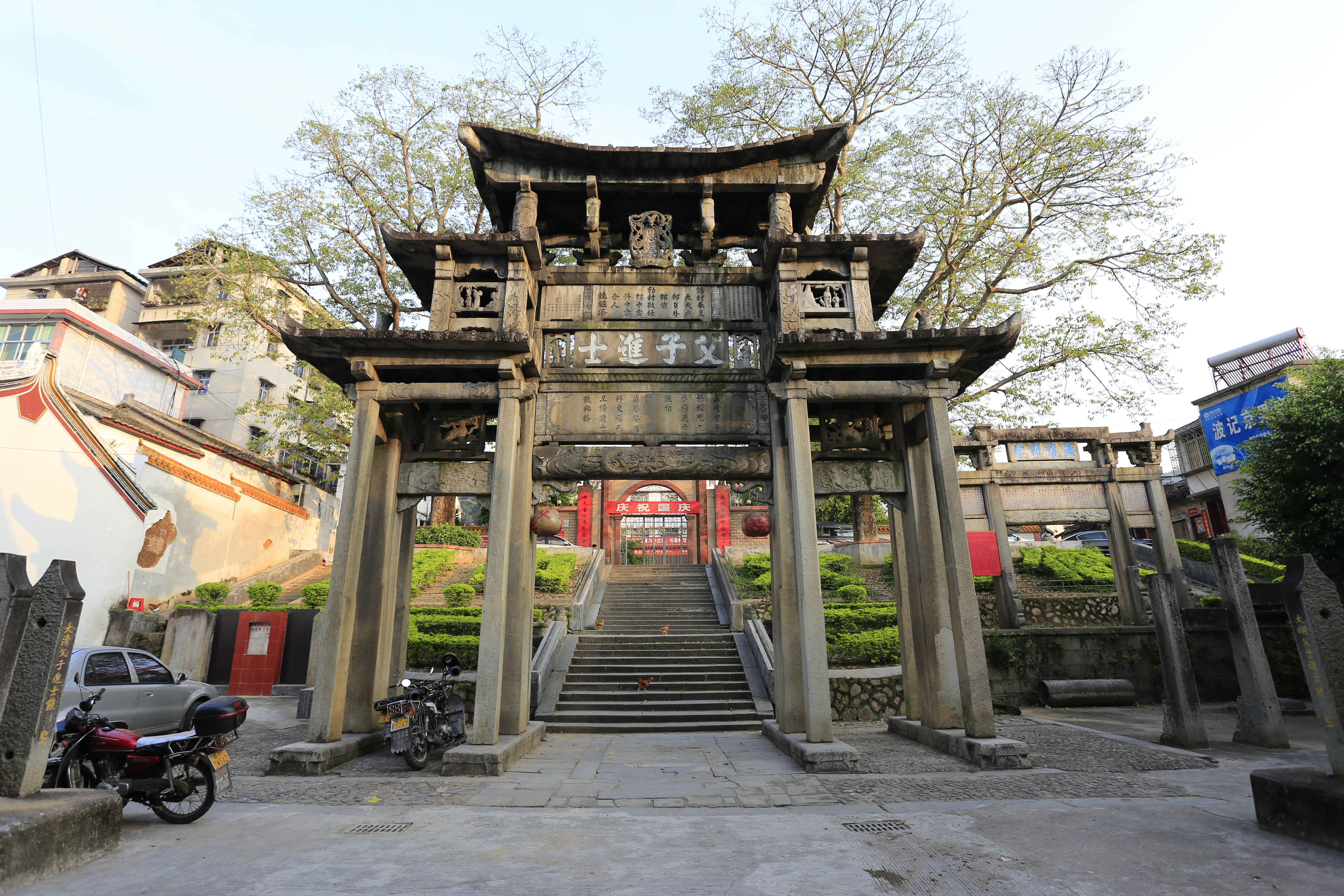 广东省大埔县茶阳镇“父子进士”牌坊—— 南面